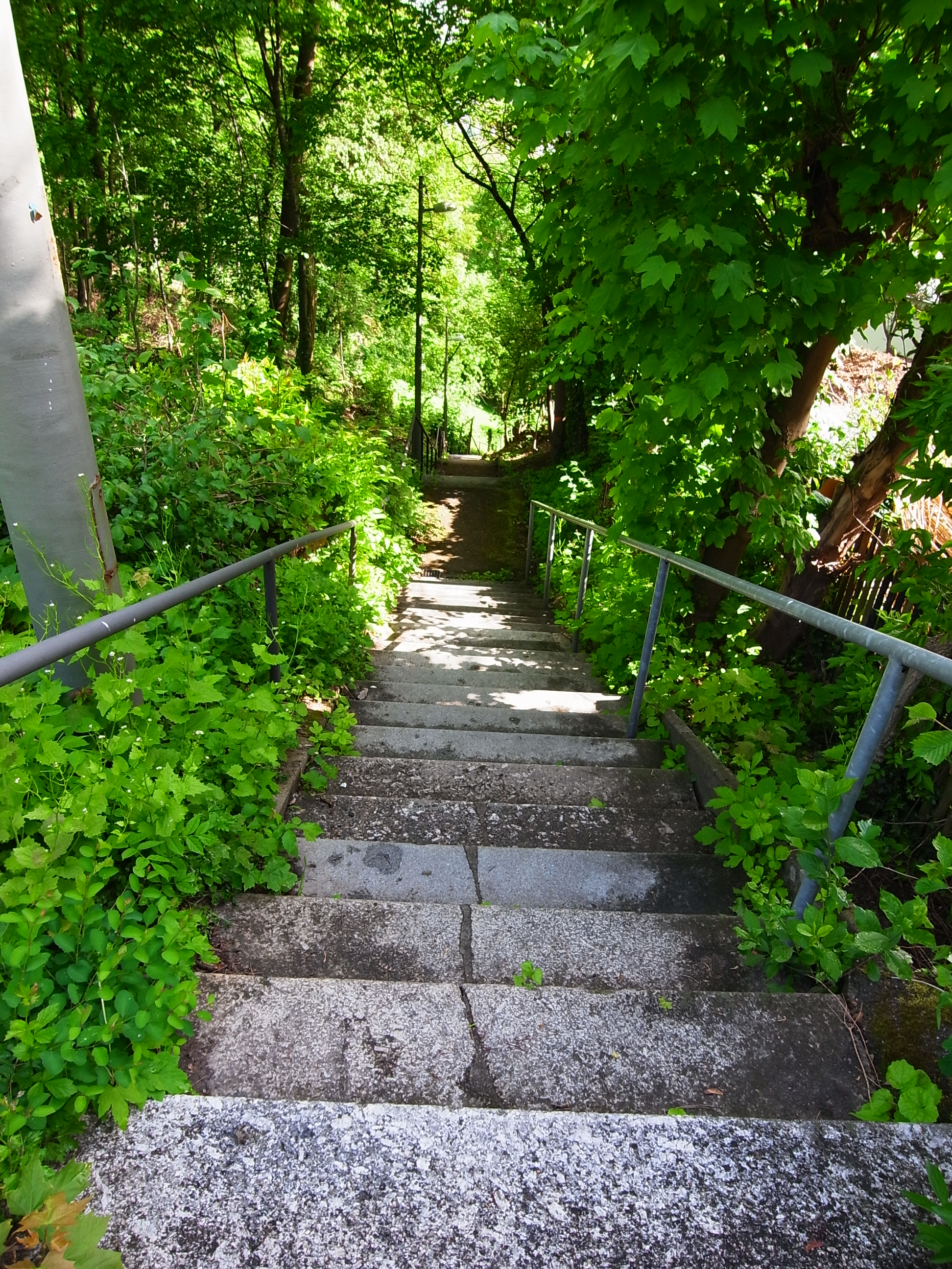 Endstück der Buchenhofstaffel auf den Hasenberg in Stuttgart; sie gehört zu den schönsten Staffeln Stuttgarts